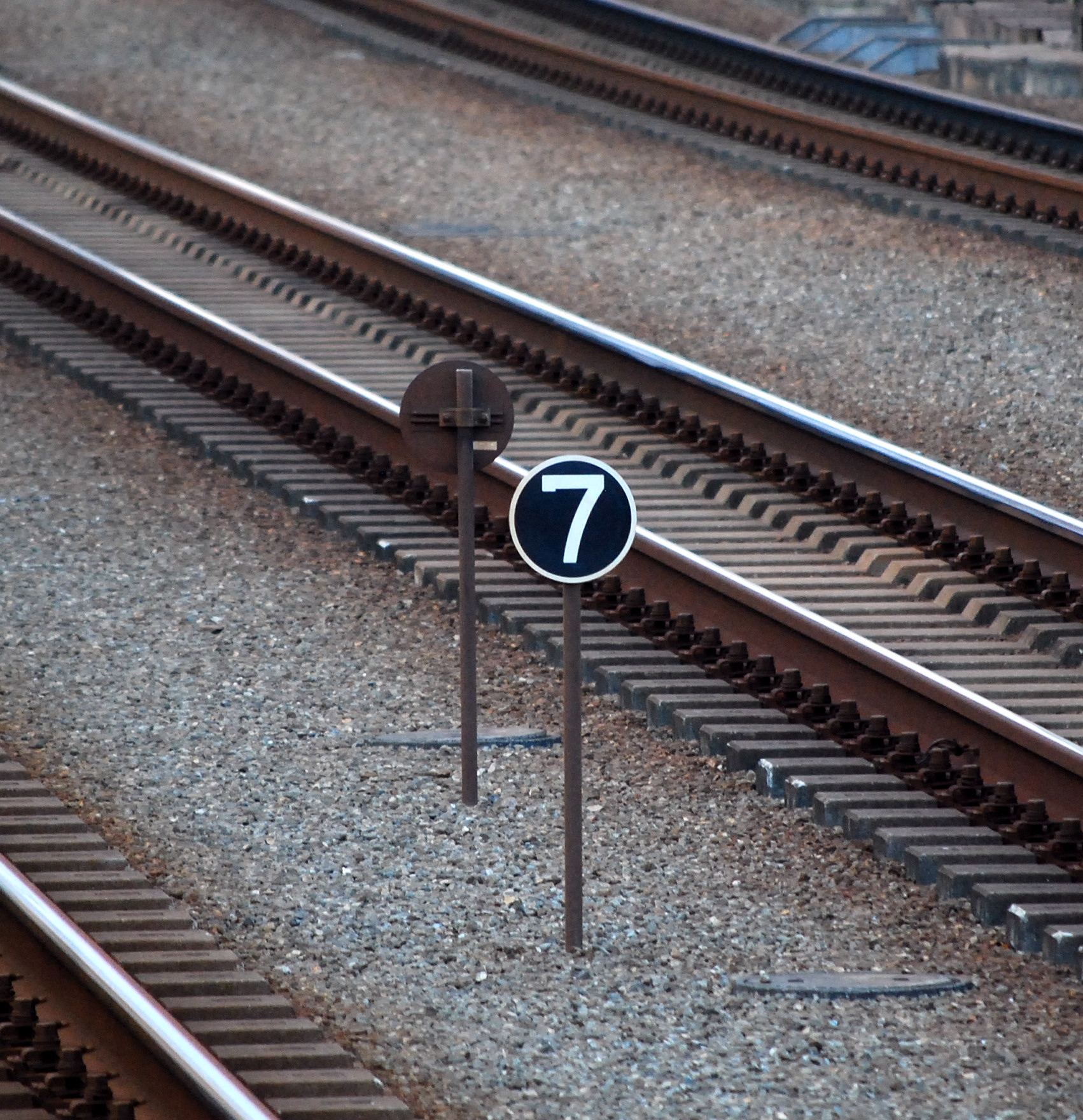 自動列車制御装置（ATC）の軌道側の閉塞境界標識。（手前の駅の場内軌道回路から7番目の軌道回路を示す、ホームから撮影）